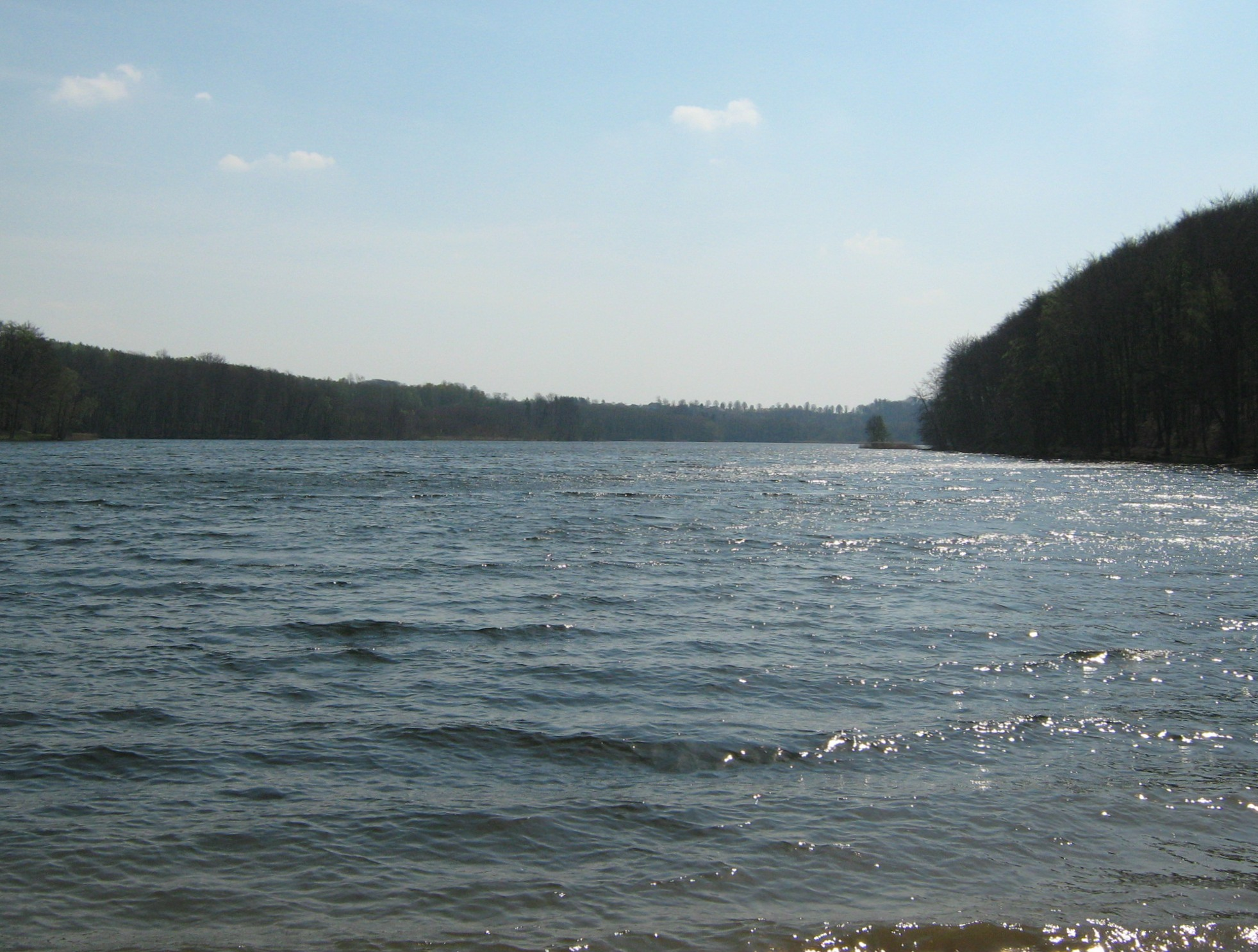 Jezioro Kamienica. Widok z północnego brzegu jeziora.